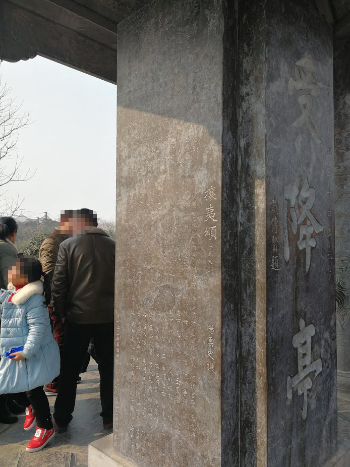 中文（中国大陆）: 受降亭石碑之攘夷颂